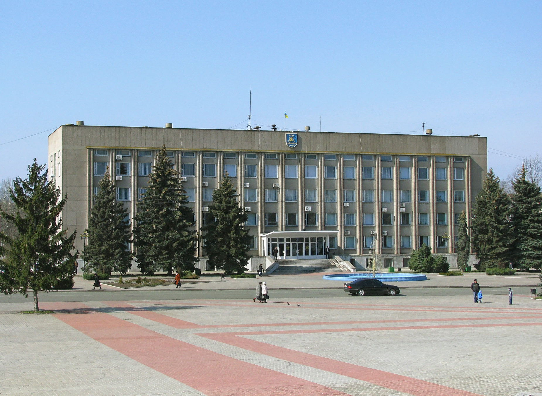 Здание городской администрации города Никополь